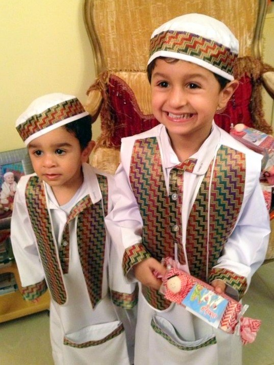 girgian-praktyk